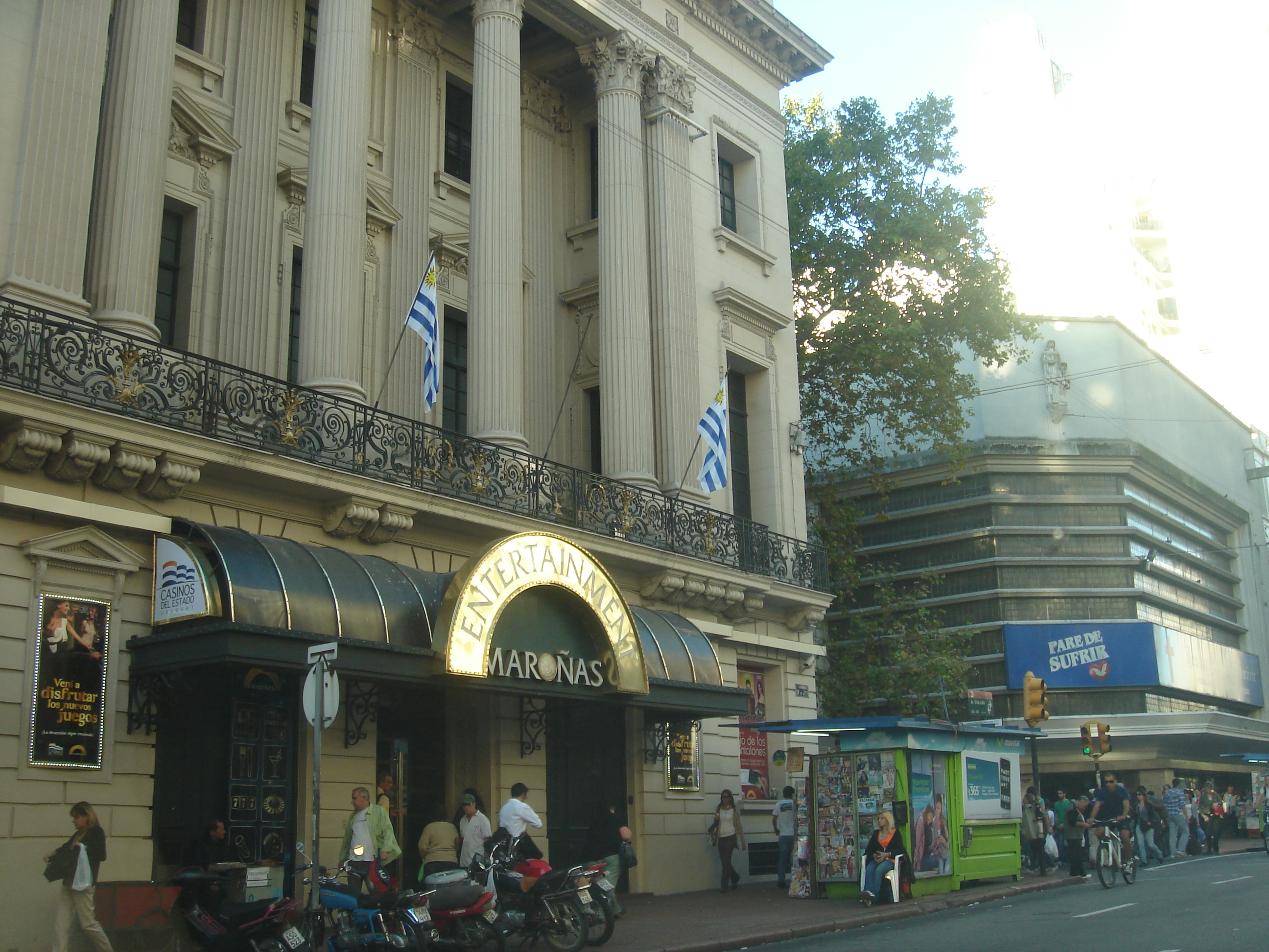 Diario "El Día", Montevideo.